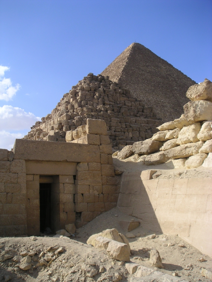 Vue sur le mastaba de Khoufoukhaf II, la pyramide d'Hénoutsen et la pyramide de Khéops à Gizeh